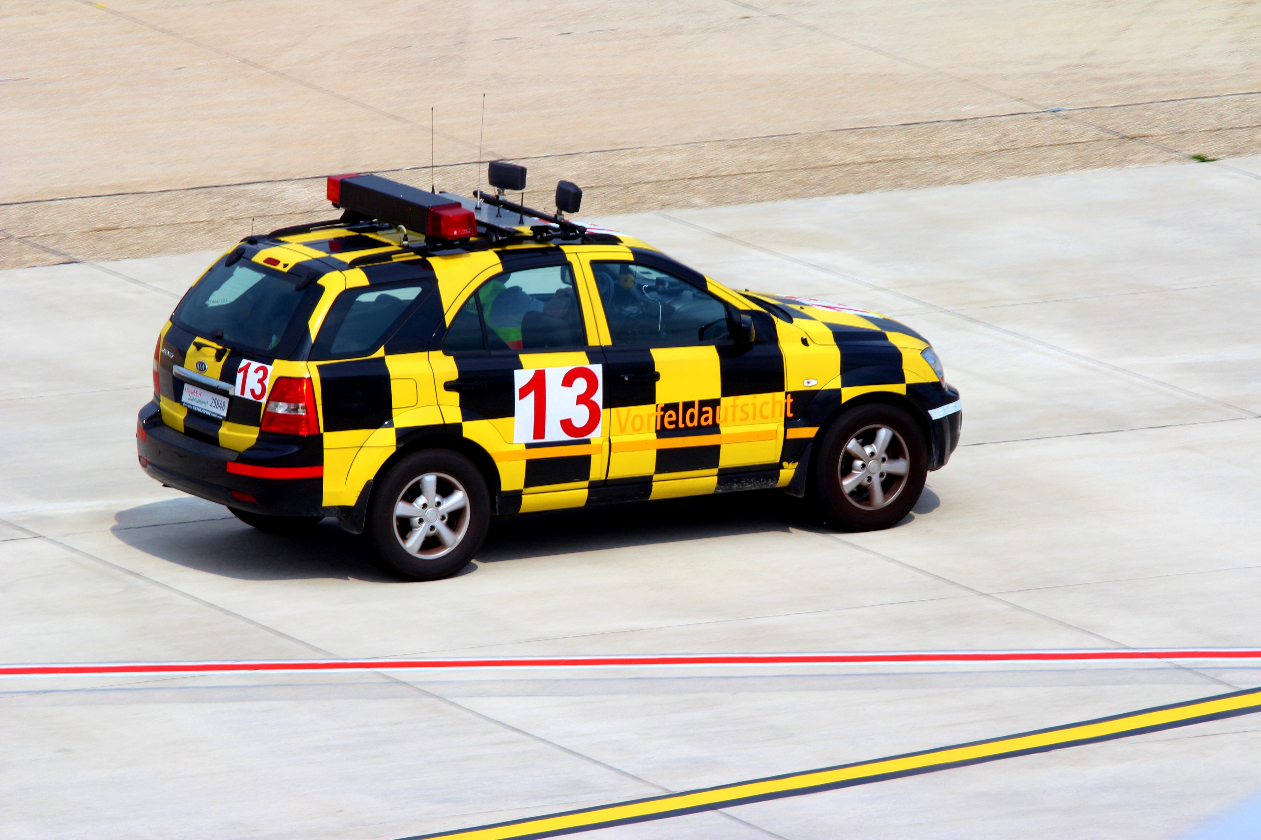 Vorfeldaufsicht DUS